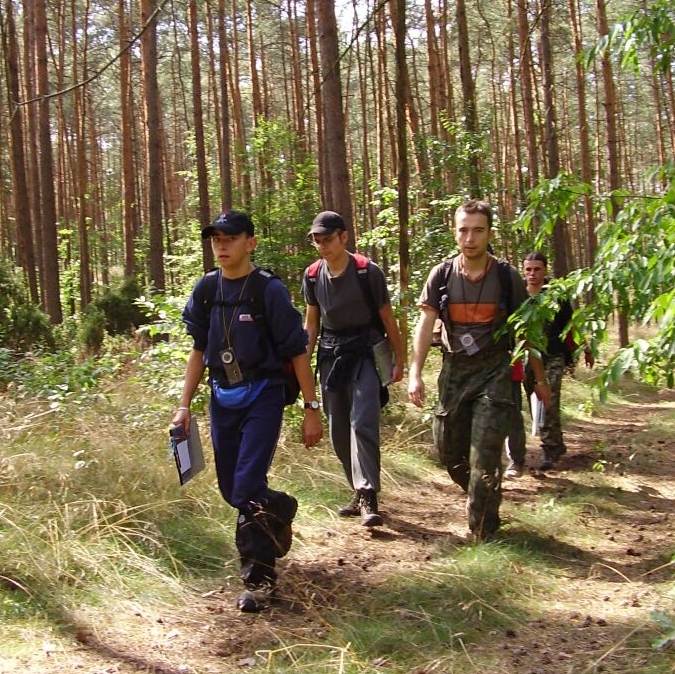 tramwaj